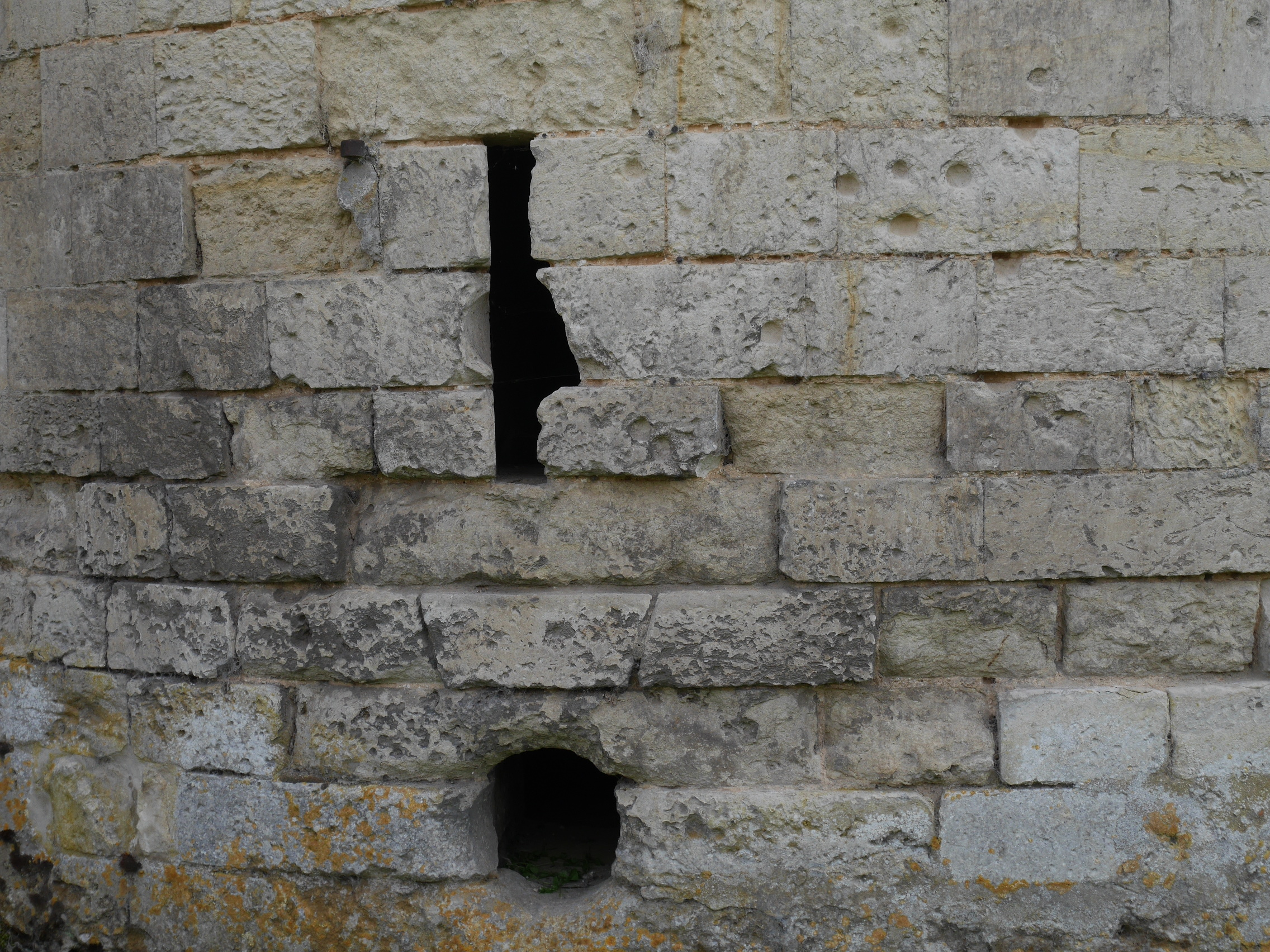 Château d'Esnes (extérieur) : archère et canonnière